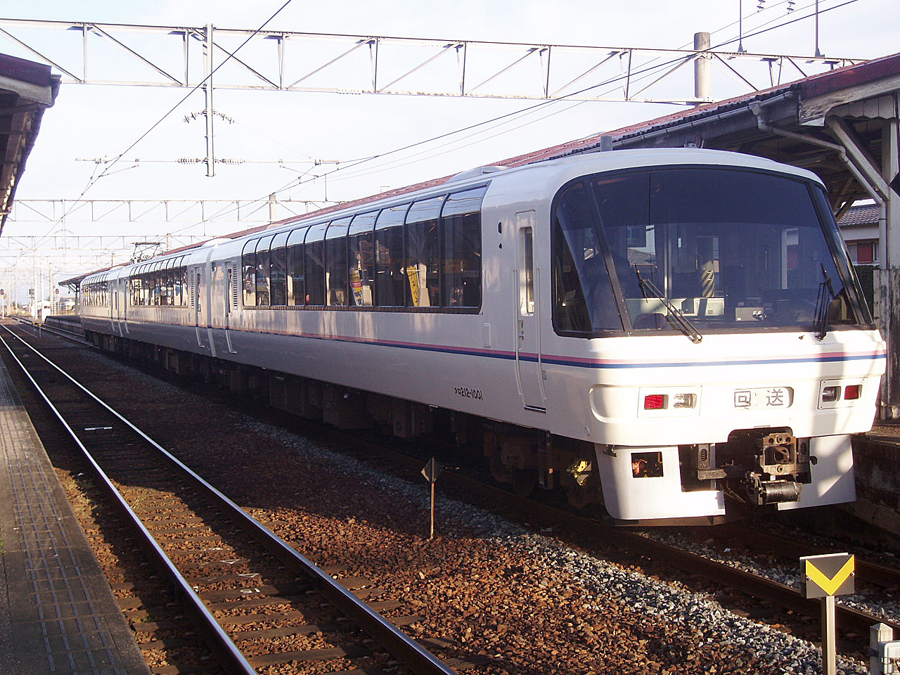 JR West 213 series "Super Saloon Yumeji" EMU 西日本旅客鉄道 スーパーサルーンゆめじ 211系・213系電車